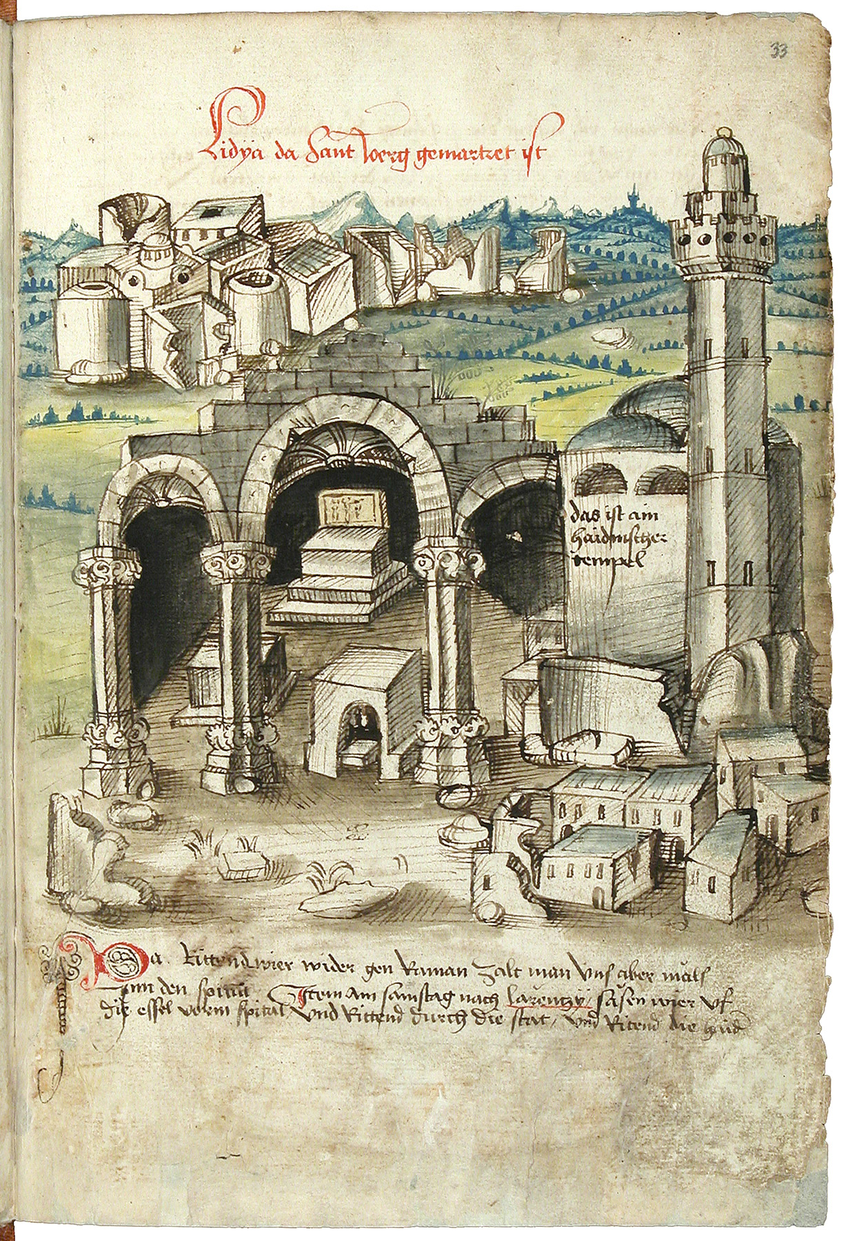 Schilderung einer Pilgerreise von Konstanz nach Jerusalem durch Konrad von Grünenberg, um 1487 Konrad von Grünenberg: Beschreibung der Reise von Konstanz nach Jerusalem - Cod. St. Peter, pap. 32. Handschrift, Bodenseegebiet (Konstanz?), um 1487. II + 53 Blätter, 32x21, mit 31 kolorierten Zeichnungen der Reiseroute von Venedig bis Palästina. Text in alemannischer Mundart.